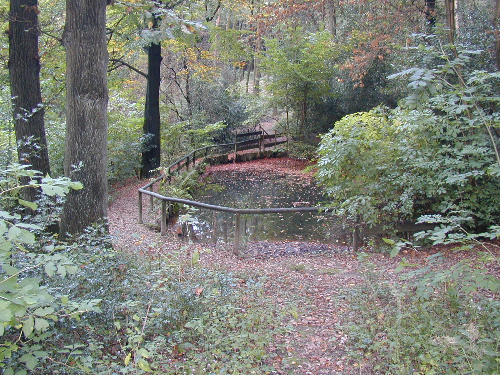 Die Schwelmequelle im Schwelm (NRW, Deutschland)